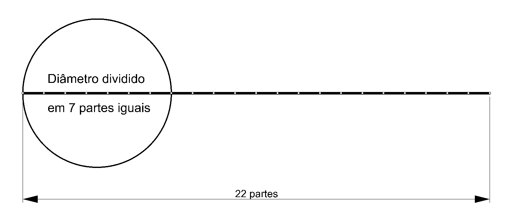 Retificação da circunferência - Processo de Arquimedes